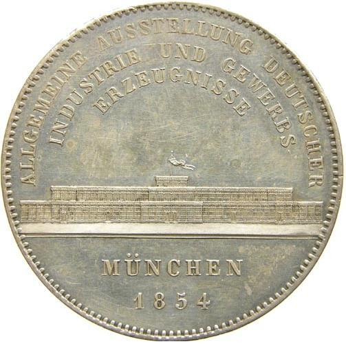 Gedenktaler zur Industrieausstellung München 1854, Vorderseite: Ausstellungshalle („Glaspalast“), Rückseite: Porträt von König Maximilian II von Bayern; Medailleur: Carl Friedrich Voigt.